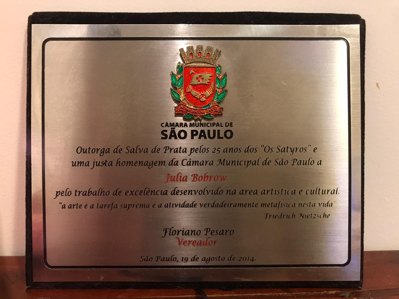 A atriz Julia Bobrow é homenageada na Câmara Municipal de São Paulo, em agosto de 2014